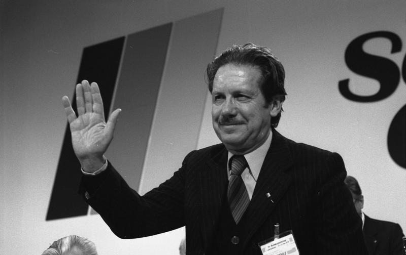 26. Bundesparteitag der CDU in der Friedrich-Ebert-Halle in Ludwigshafen 23.-25.10.1978